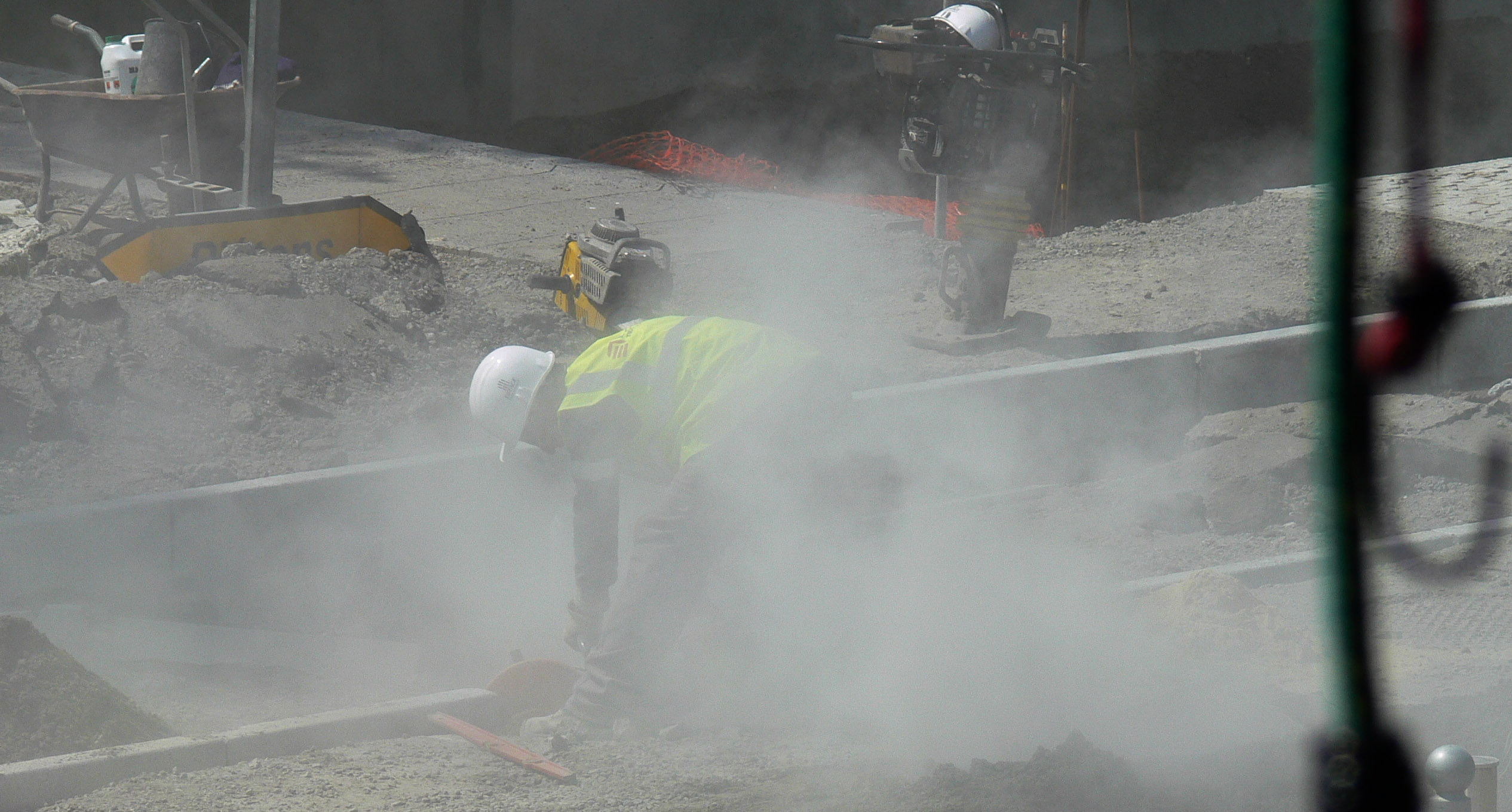 poussière émise par la découpe de béton avec une meuleuse. Selon les pays il est recommandé ou obligatoire de porter un masque FFP2 ou FFP3 pour se protéger les poumons.